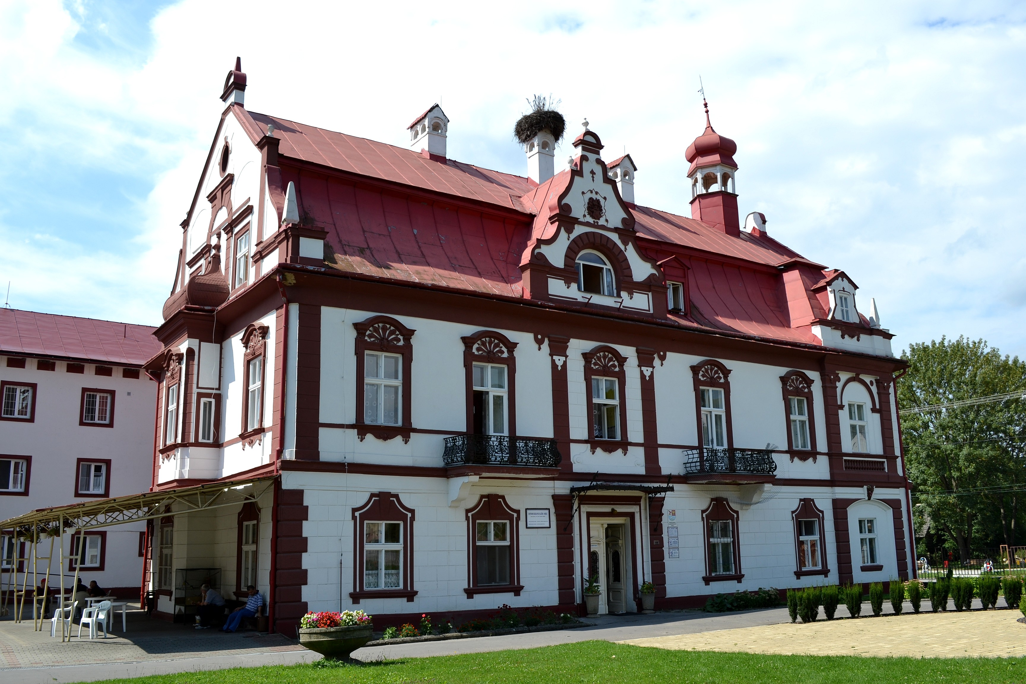 Dolný Lieskov (okr. Považská Bystrica), neskororenesančný kaštieľ; celkový pohľad